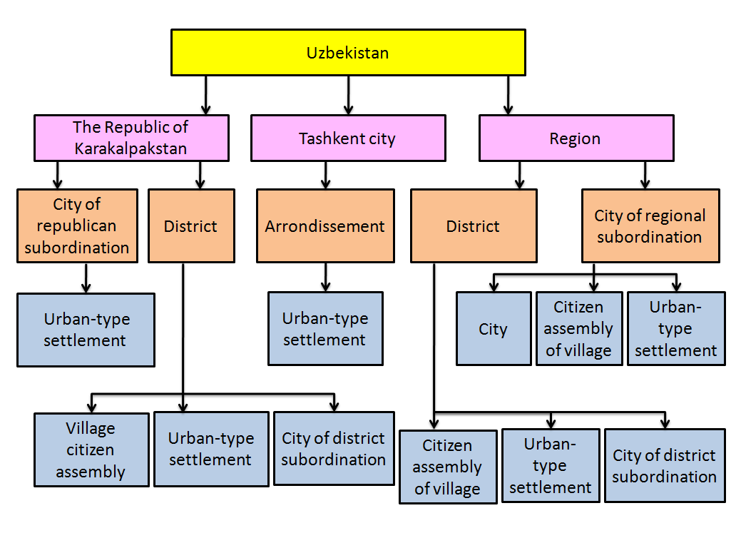 Схема АДТ Узбекистана